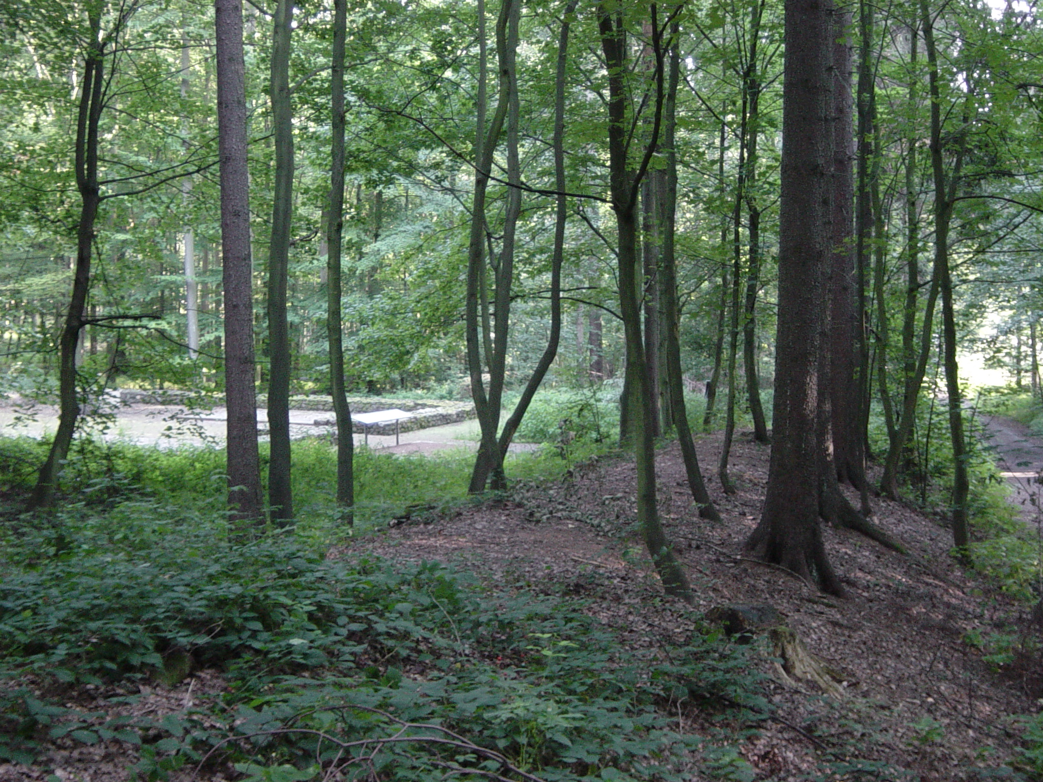 Römisches Kleinkastell am Obergermanisch-Raetischen Limes, vom Limeswall